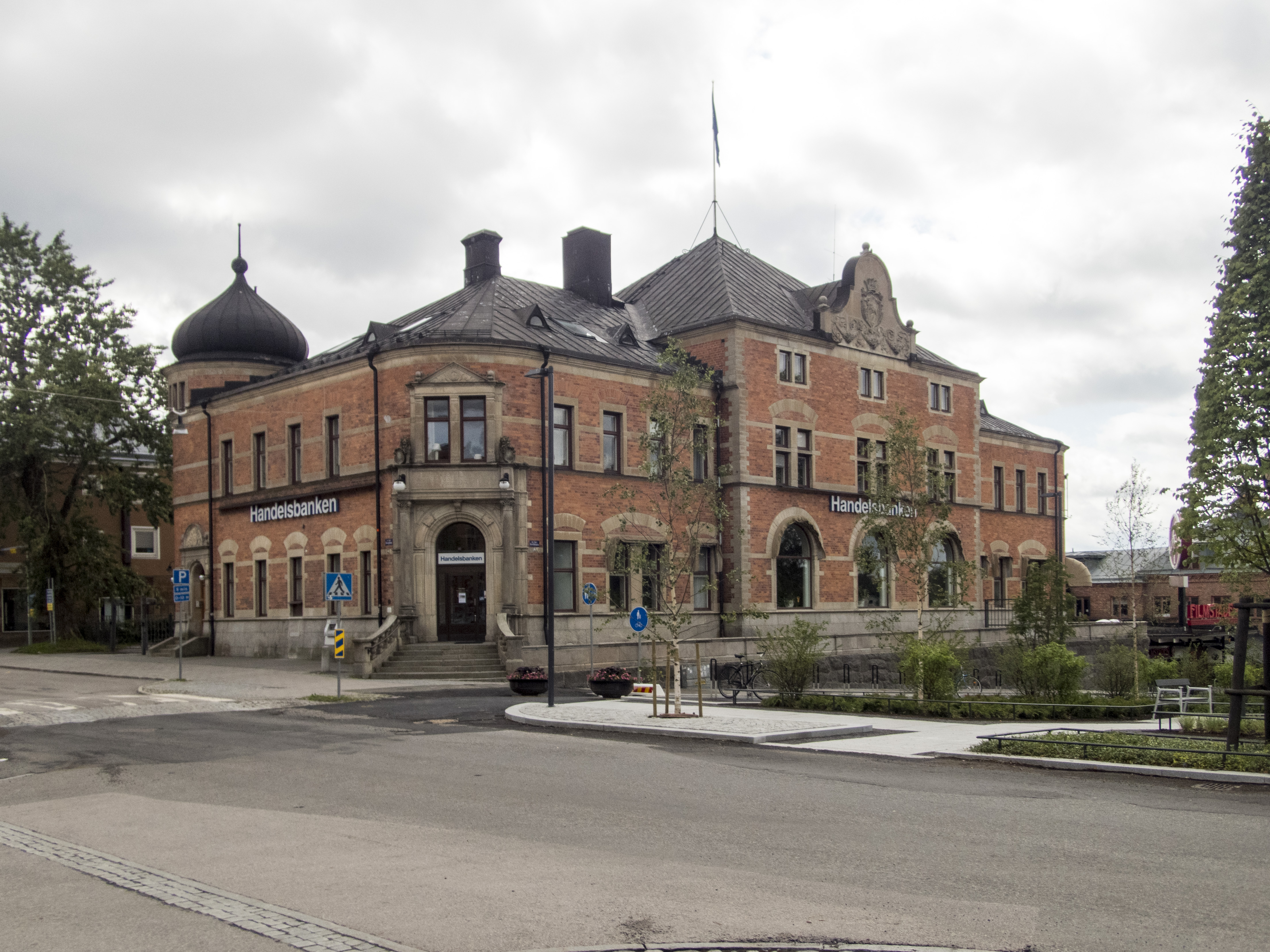 Westerbottens enskilda bank, Umeå. Byggnadsår 1894. Arkitekt Ernst Stenhammar.